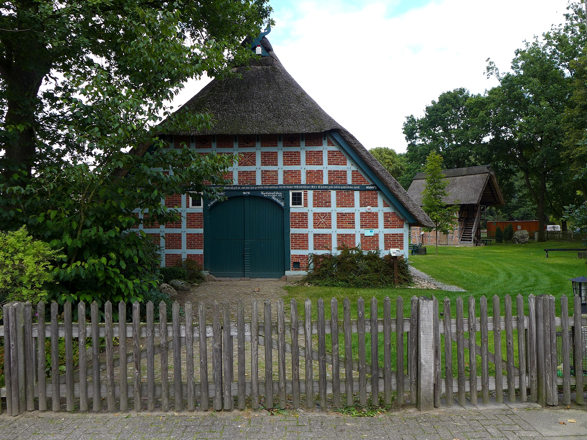 Ensemble verschiedener historischer Bauten auf dem Gelände des Heimatmuseums Scheeßel. Ansicht 09-2014.